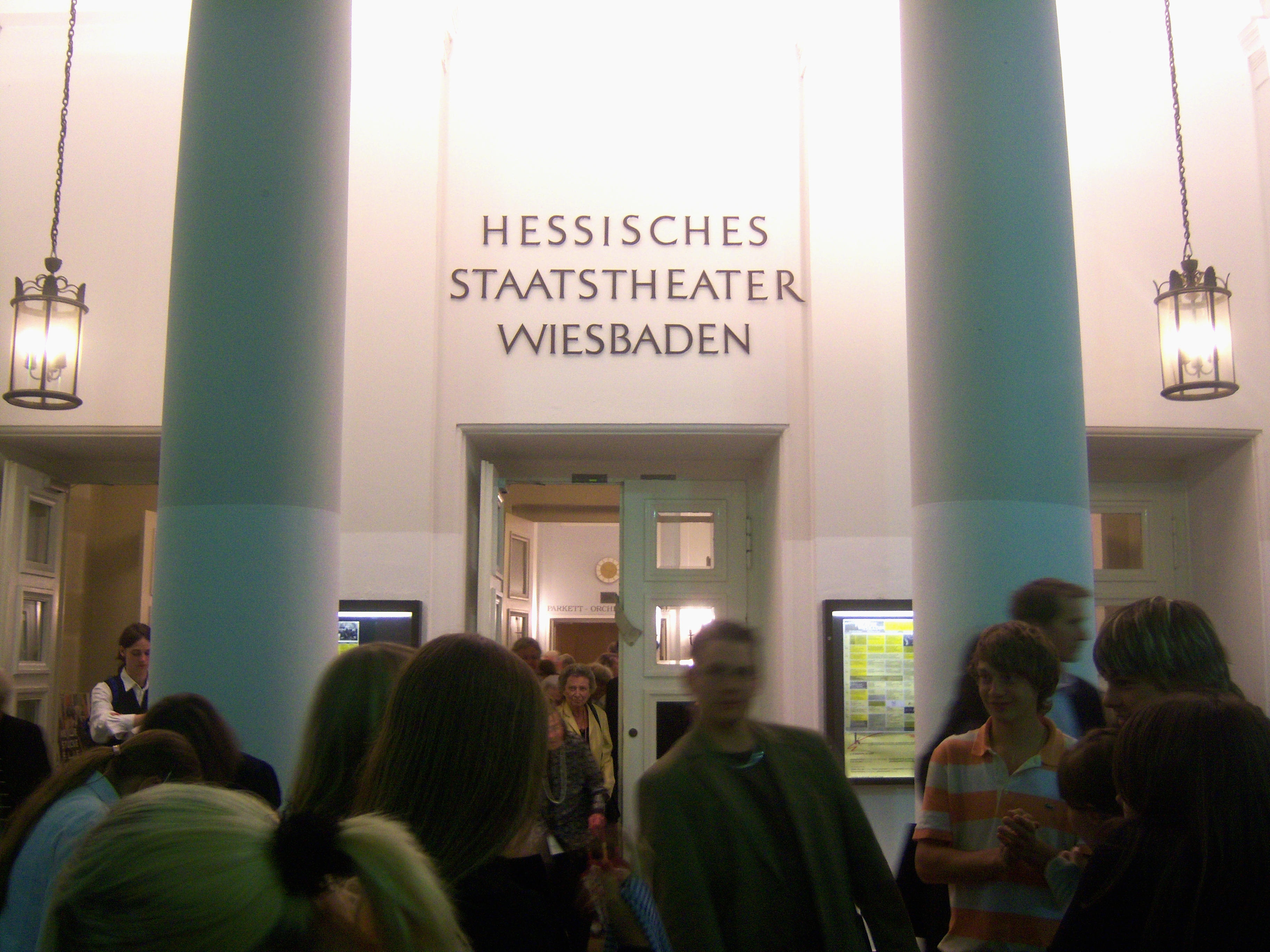 Der Haupteingang des Hessischen Staatstheaters Wiesbaden in Hessen (Deutschland)